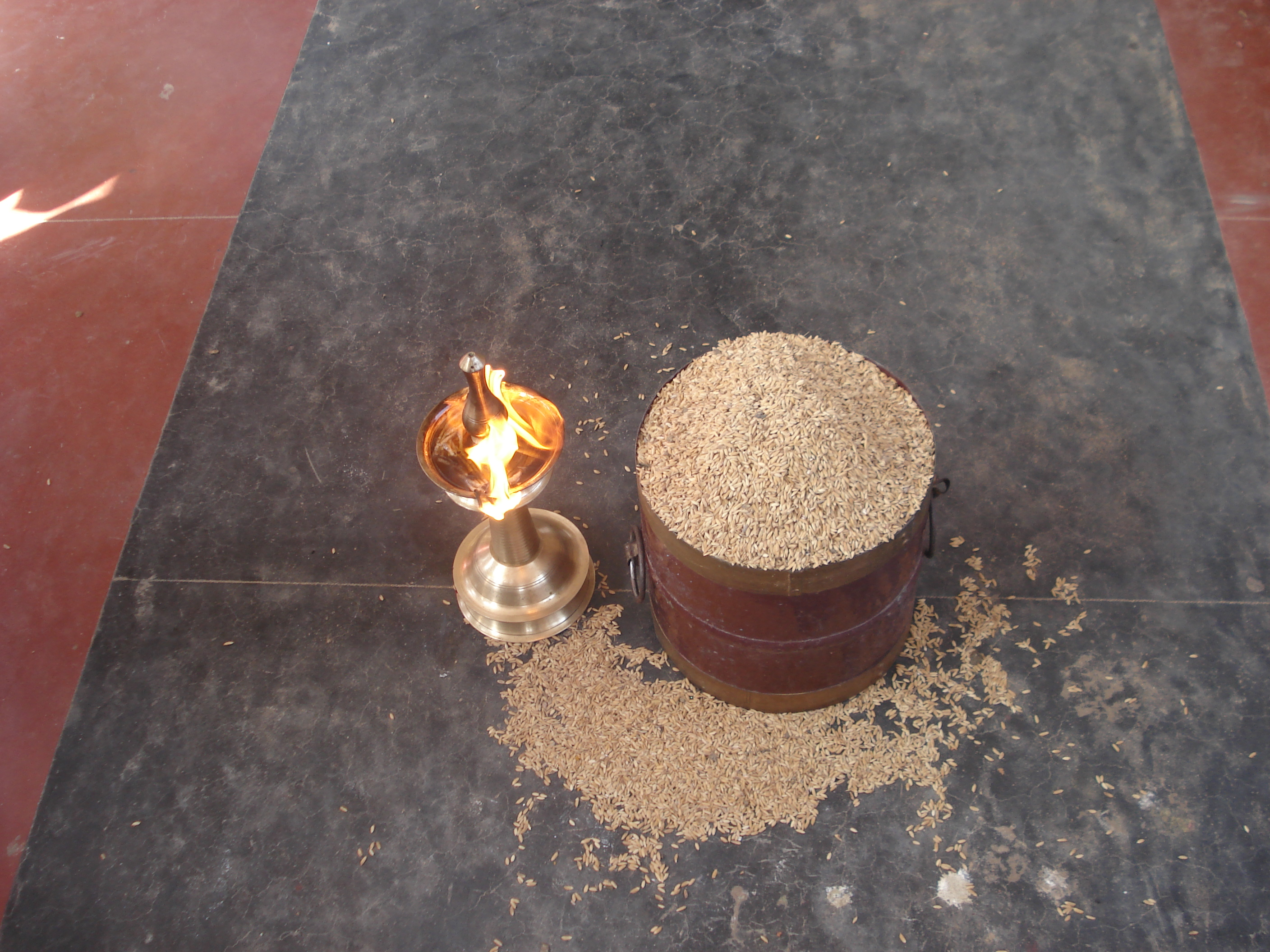 പറയും വിളക്കും